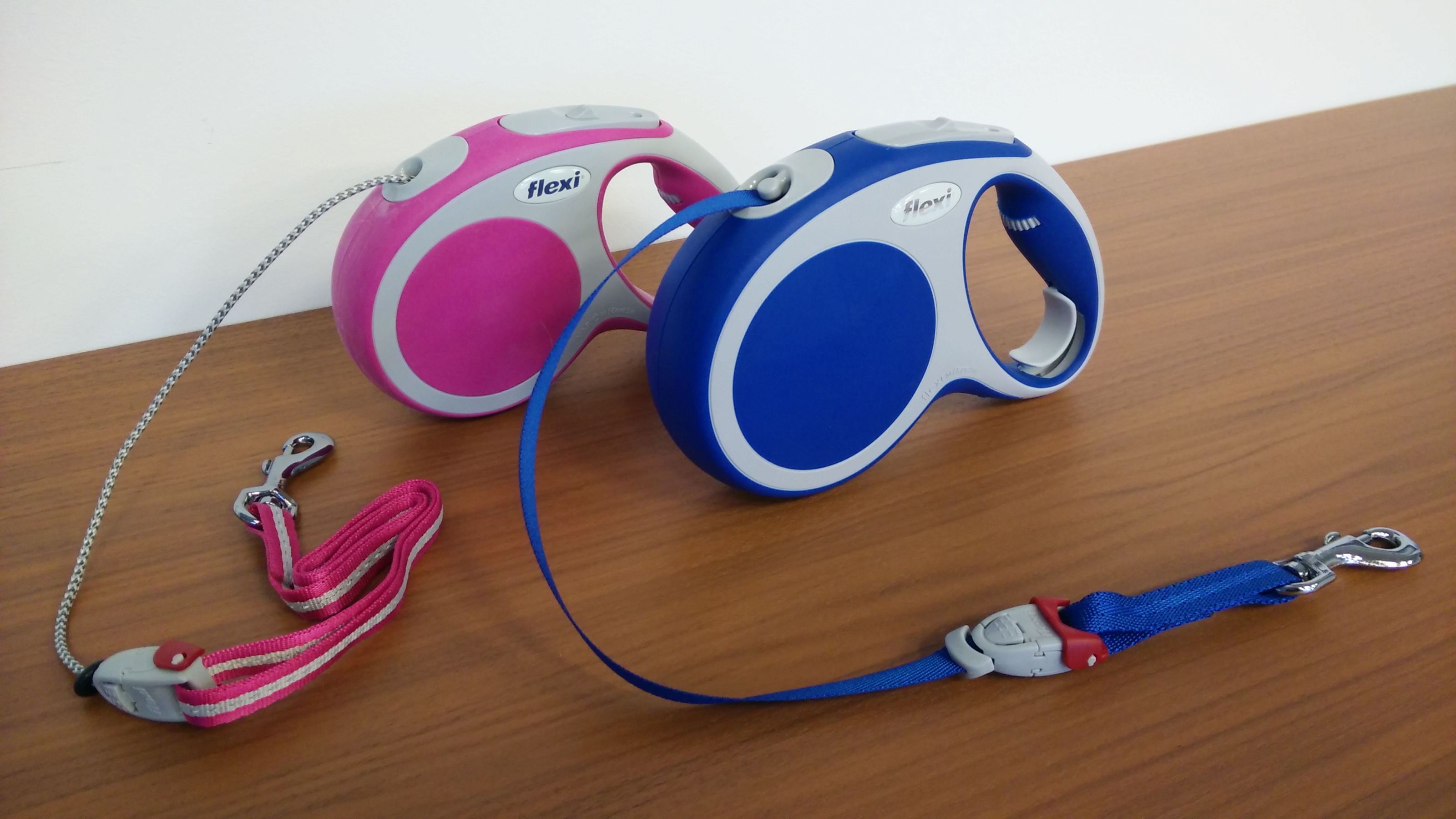 Beispiele einer Seilleine und einer Gurtleine